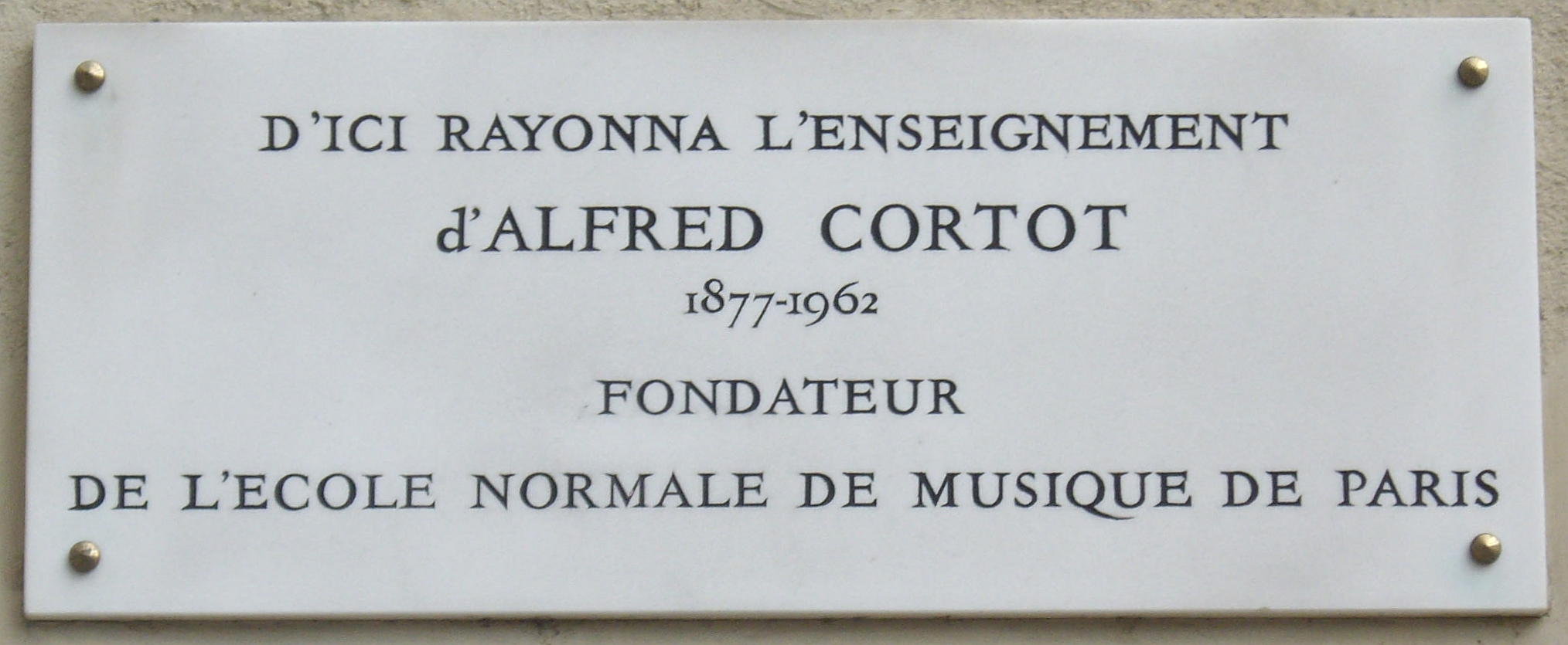 Plaque commémorative sur la façade de l'École normale de musique de Paris, 114 bis boulevard de Malesherbes, Paris 17e. « D'ici rayonna l'enseignement d'Alfred Cortot, 1877-1962, fondateur de l'École normale de musique de Paris. »